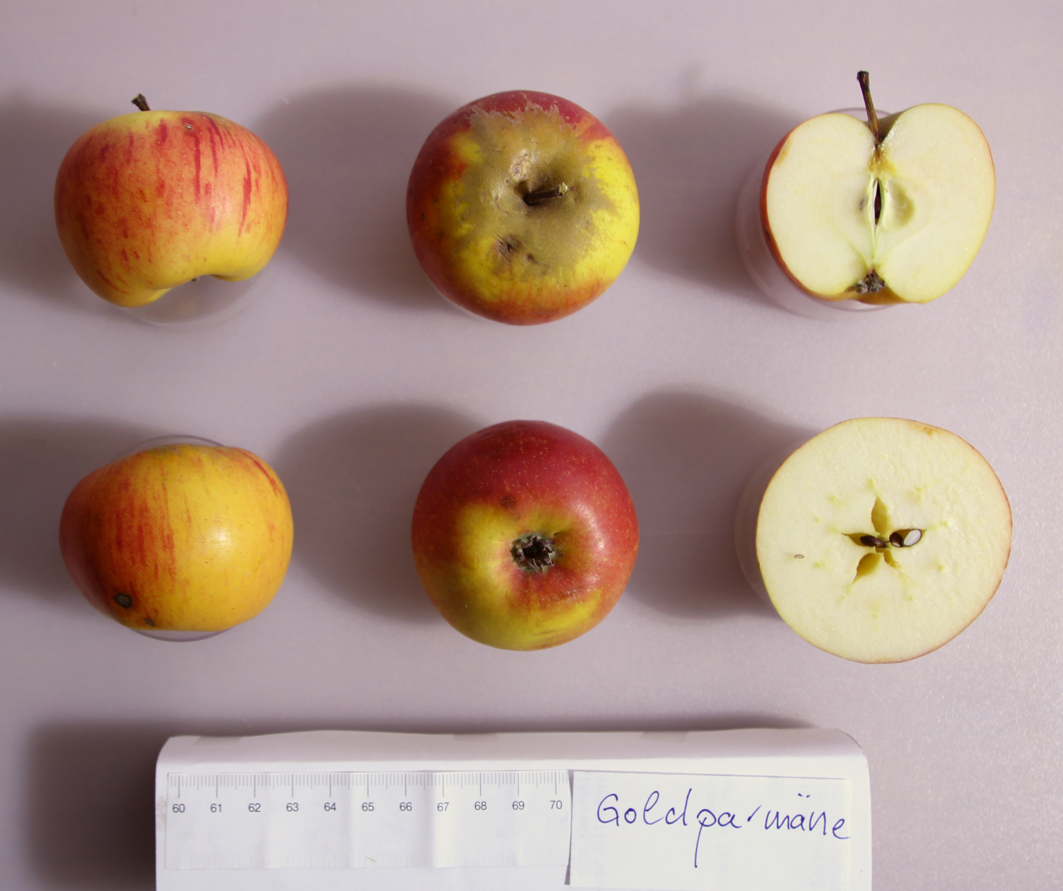 Bildinhalt: Sechs Ansichten von Äpfeln der Sorte Goldparmäne Aufnahmeort: Frankfurt am Main, Deutschland